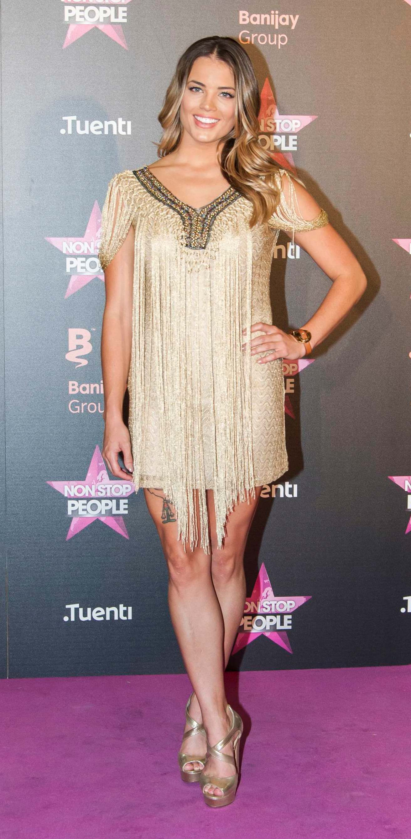 La estadounidense Alyson Eckmann.